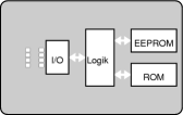 Aufbau einer synchronen Chipkarte. Dieses Bild wurde von Martin Hawlisch erstellt und unter der GFDL veröffentlicht.